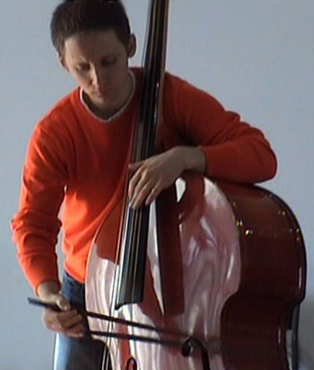 Srpskohrvatski / српскохрватски: Kontrabasista, fotografisao Radivoj Lazić, 17. 3. 2010 Sažetak - Сажетак Description Kontrabasista Date17. 3. 2010. godine.Sourcelični radAuthorRadivoj Lazić Kontrabasista